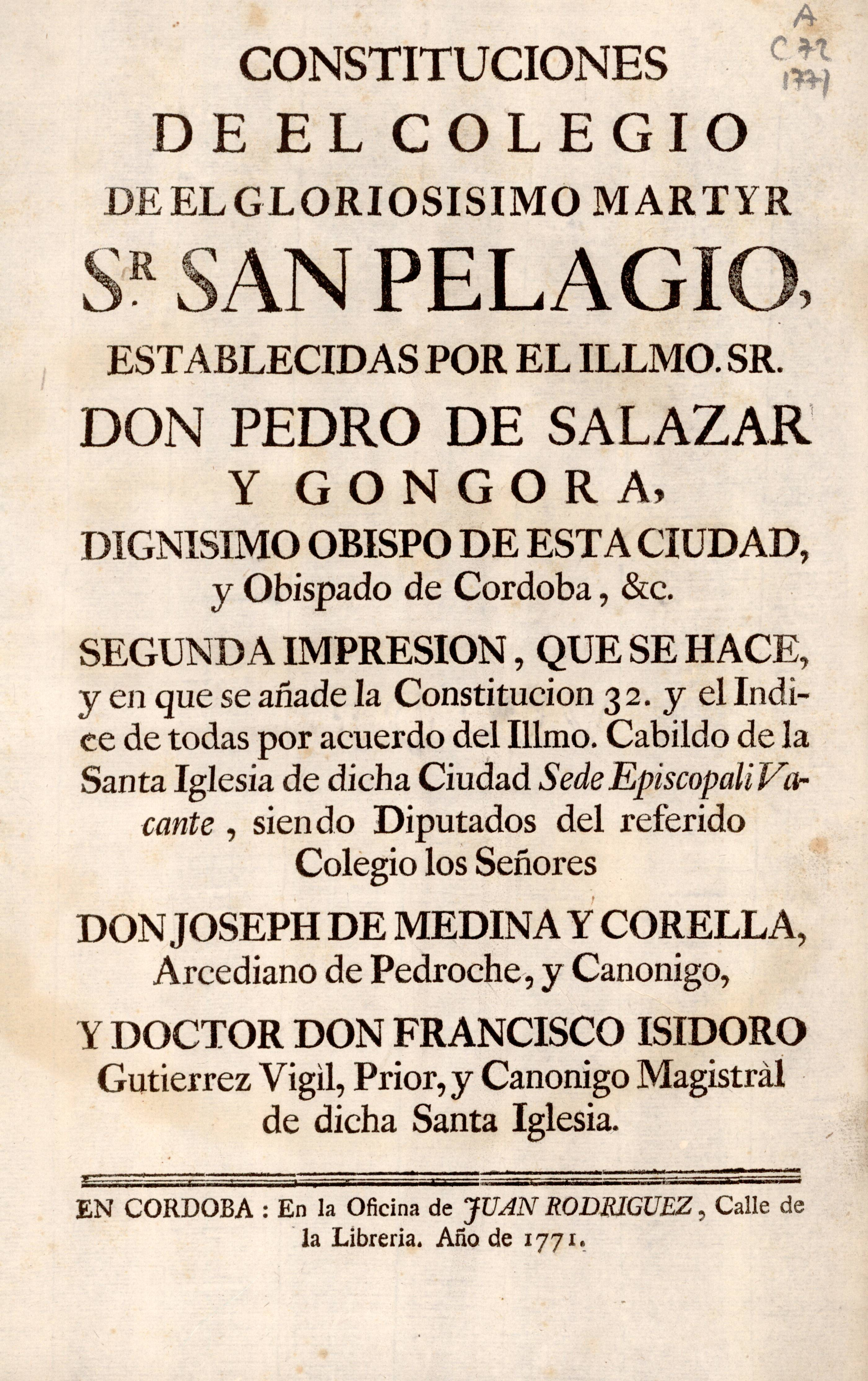 Constituciones de el Colegio de el gloriosisimo martyr Sr. San Pelagio establecidas por el ilmo. Sr. Don Pedro de Salazar y Gongora, dignisimo Obispo de esta ciudad y obispado de Cordoba